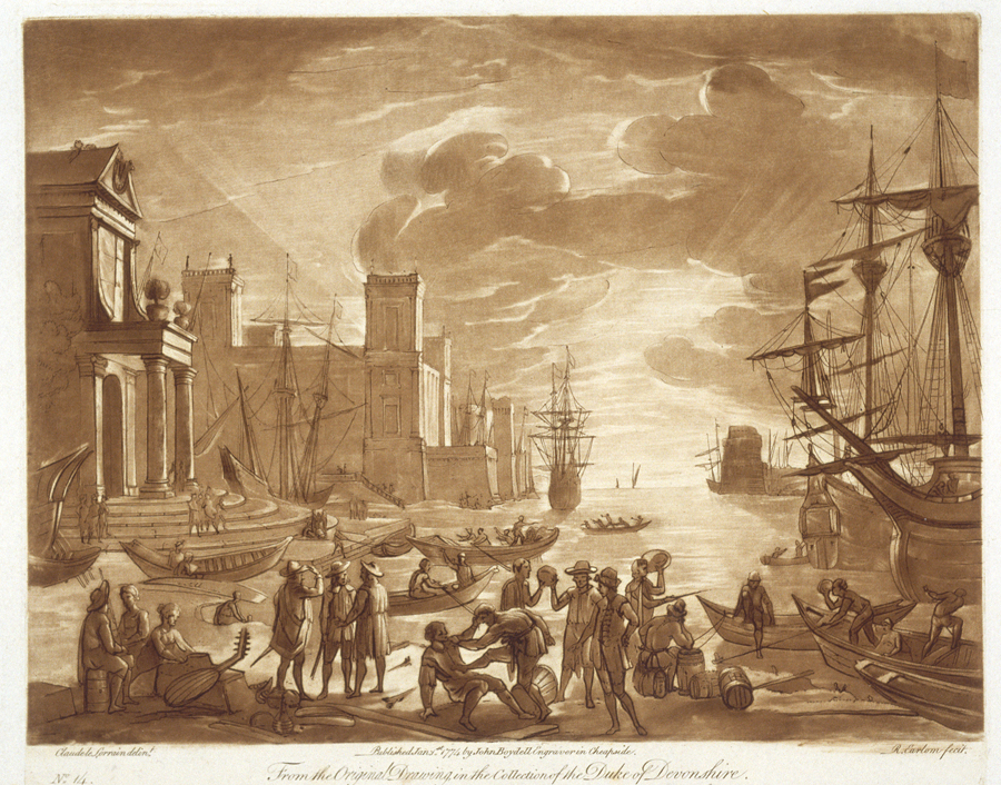 Puesta de sol en un puerto, dibujo nº 14 del Liber Veritatis.